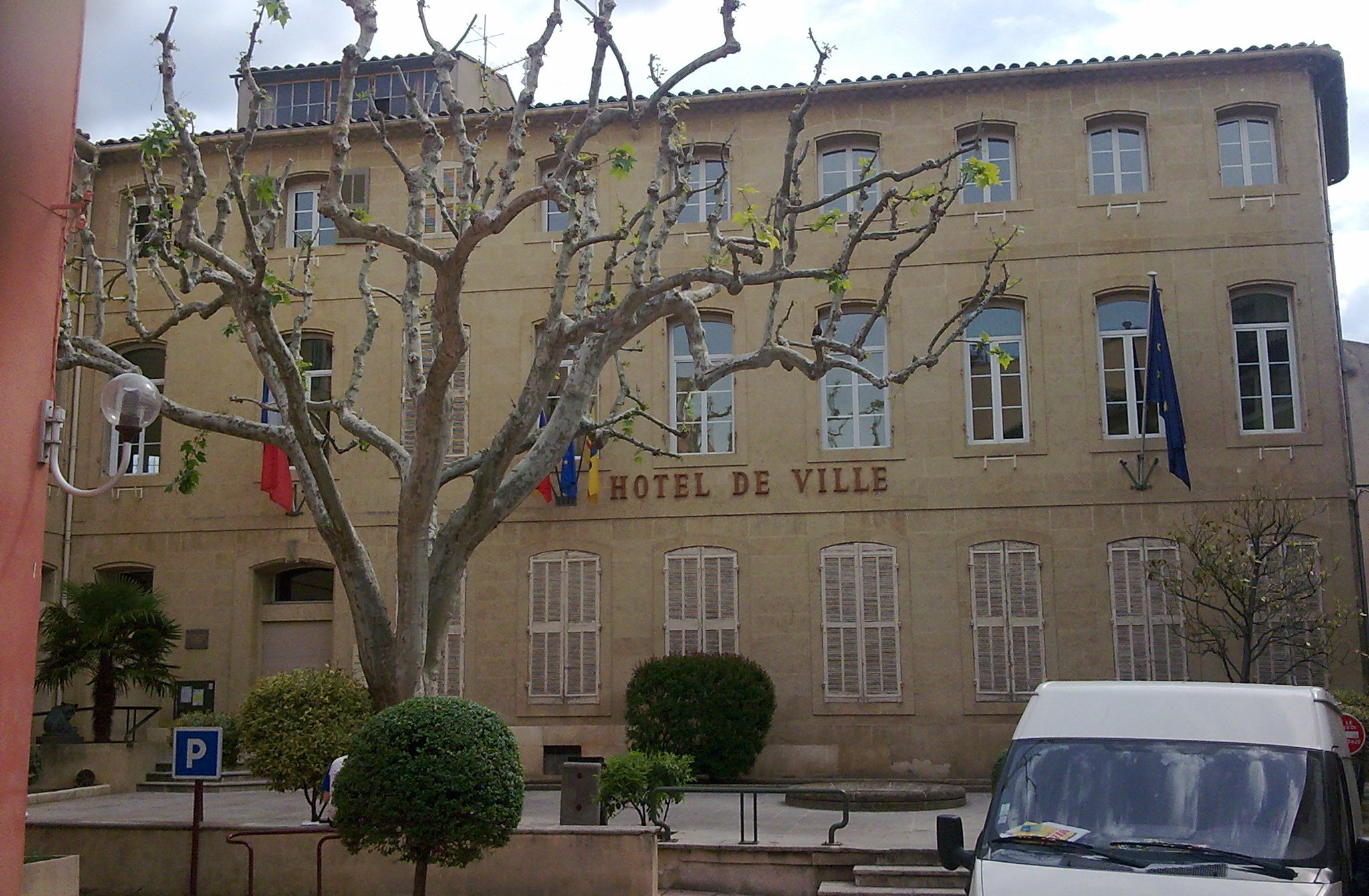 Hotel de ville de Pertuis (Vaucluse)